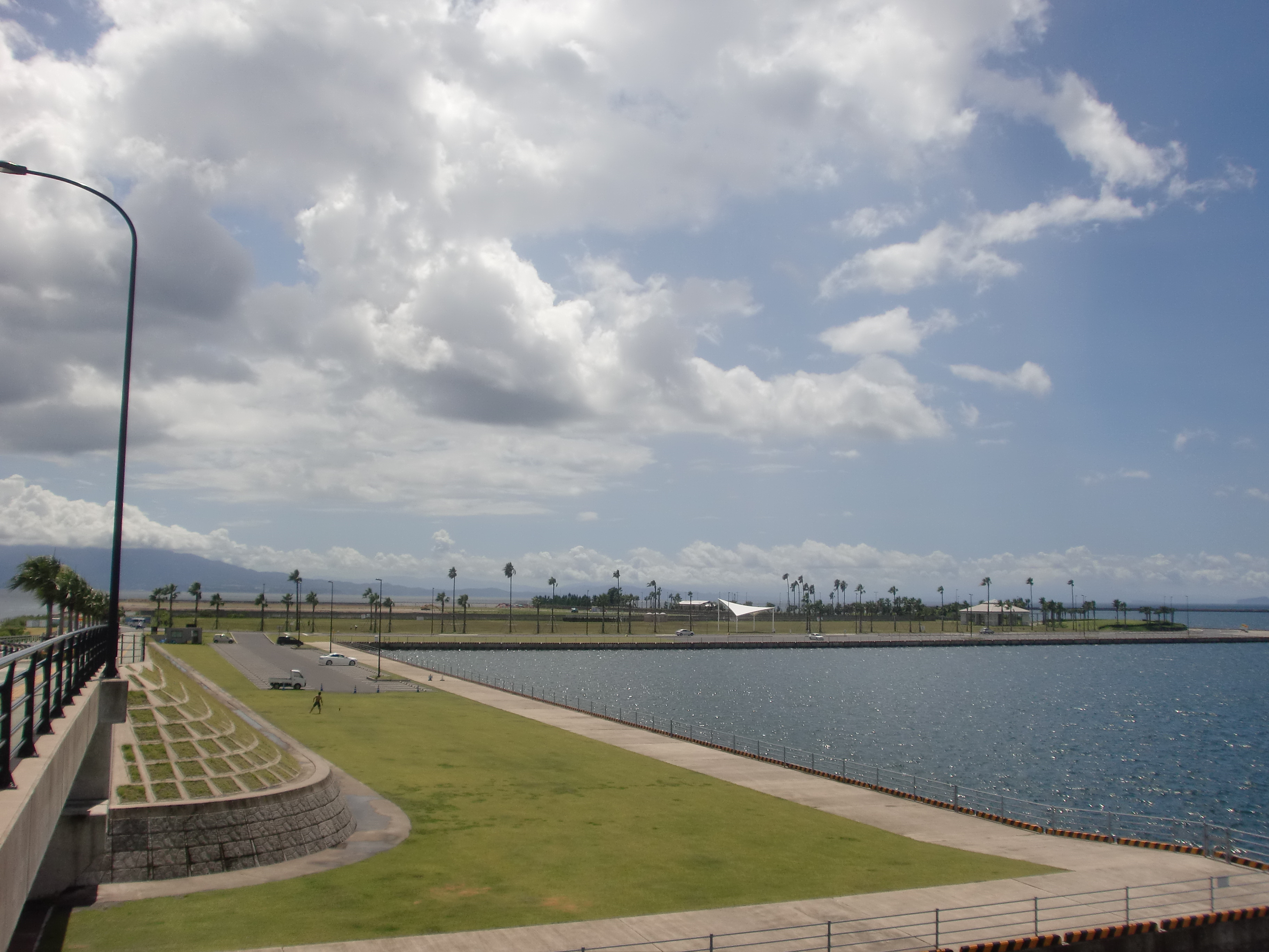 中央港新町（マリンポート鹿児島）の全景